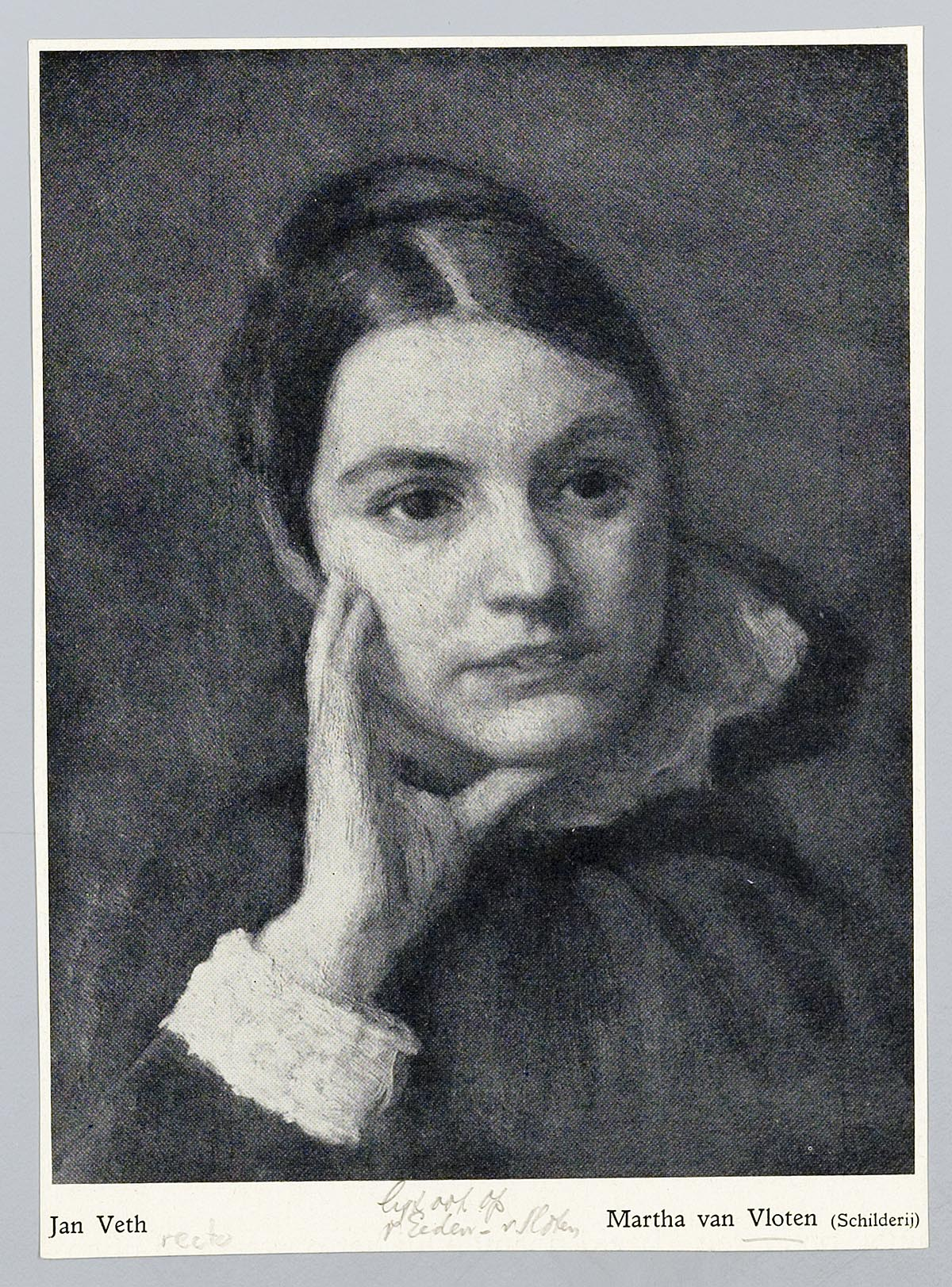 Portrait of Martha van Vloten, a Dutch translator